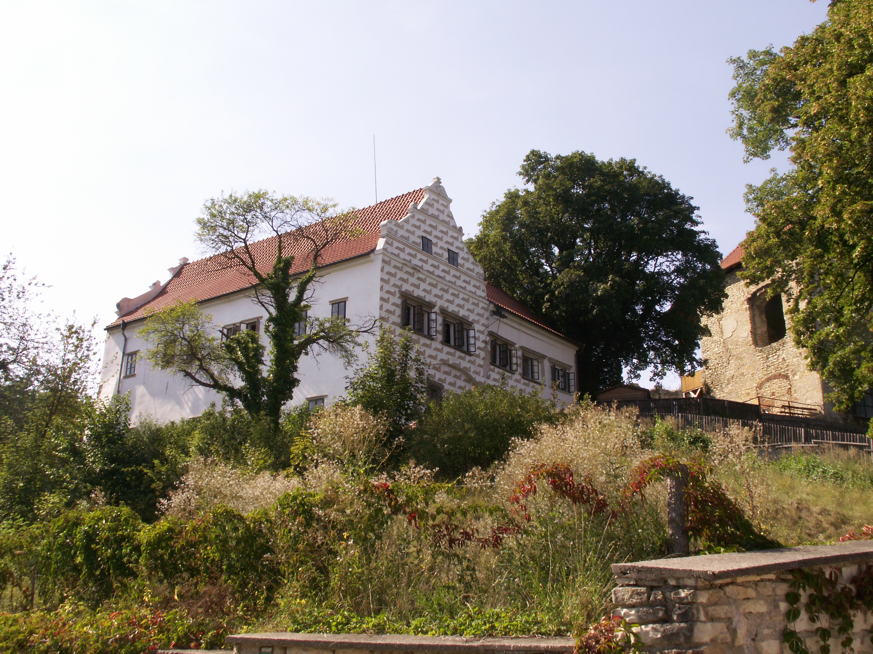 Hrad Košumberk, částečná zřícenina (Luže), Luže